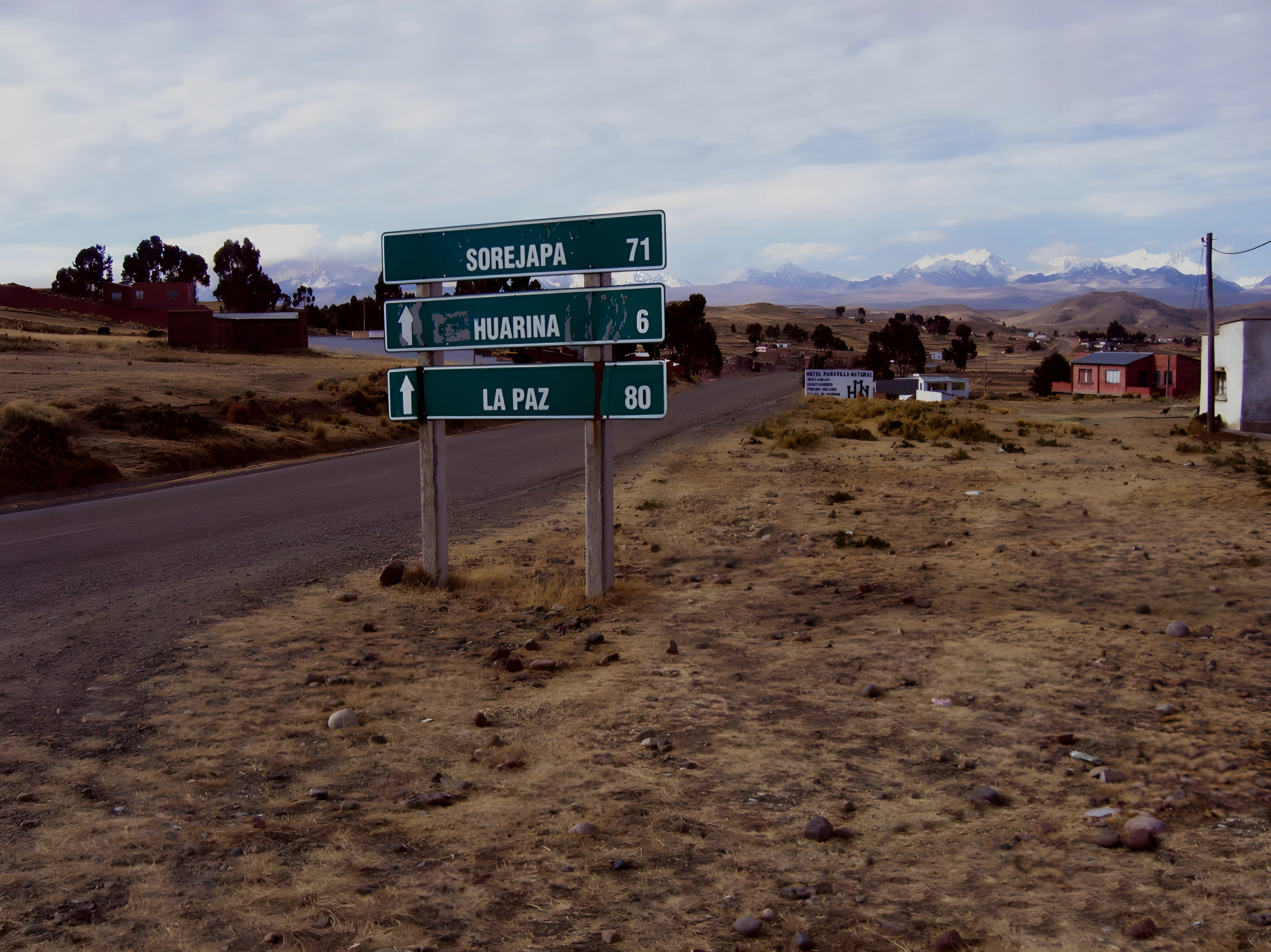 Huarina, Province d'Omasuyos.- La Paz Department (Bolivia), Bolivie. Huarina